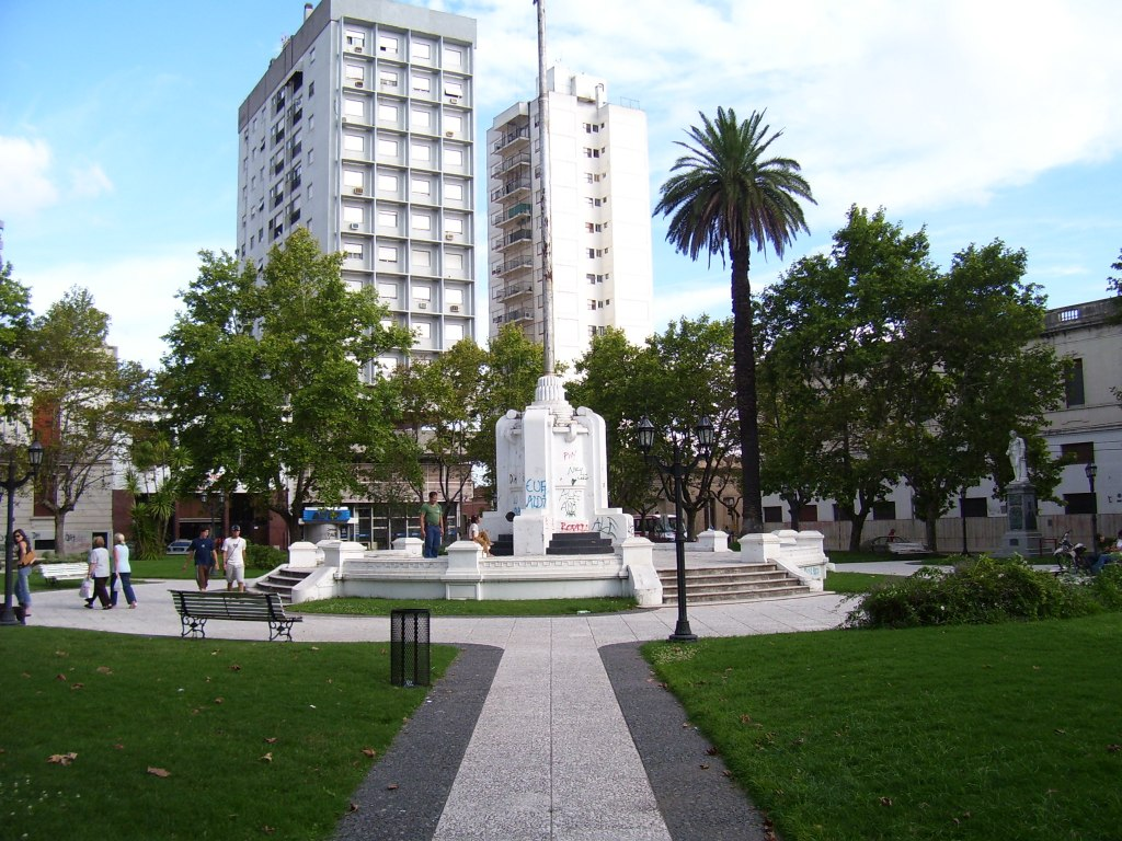 Plaza Merced, Pergamino, Argentina.